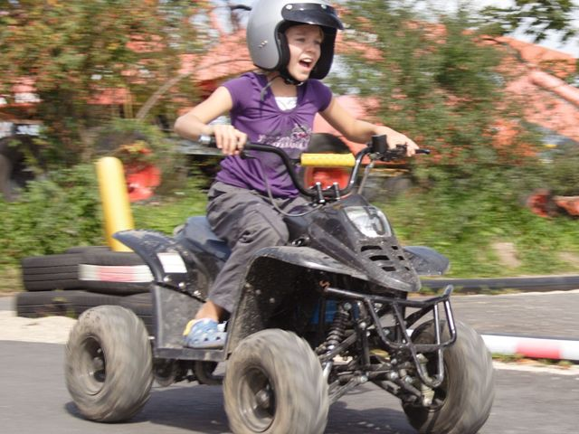 Dieses Bild zeigt ein Quad, das auf der geteerten Quadrennbahn im Monsterpark Rattelsdorf fährt. Es wurde im Jahr 2011 im Monsterpark Rattelsdorf aufgenommen.